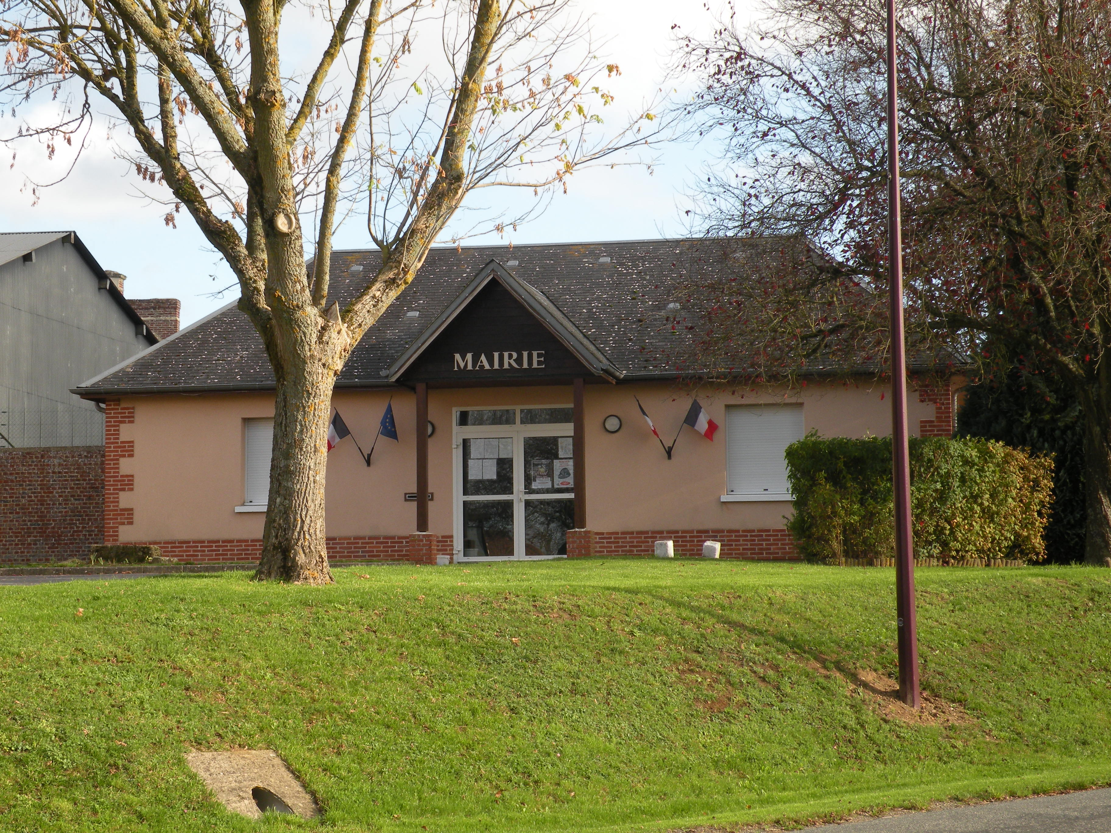 Juvignies